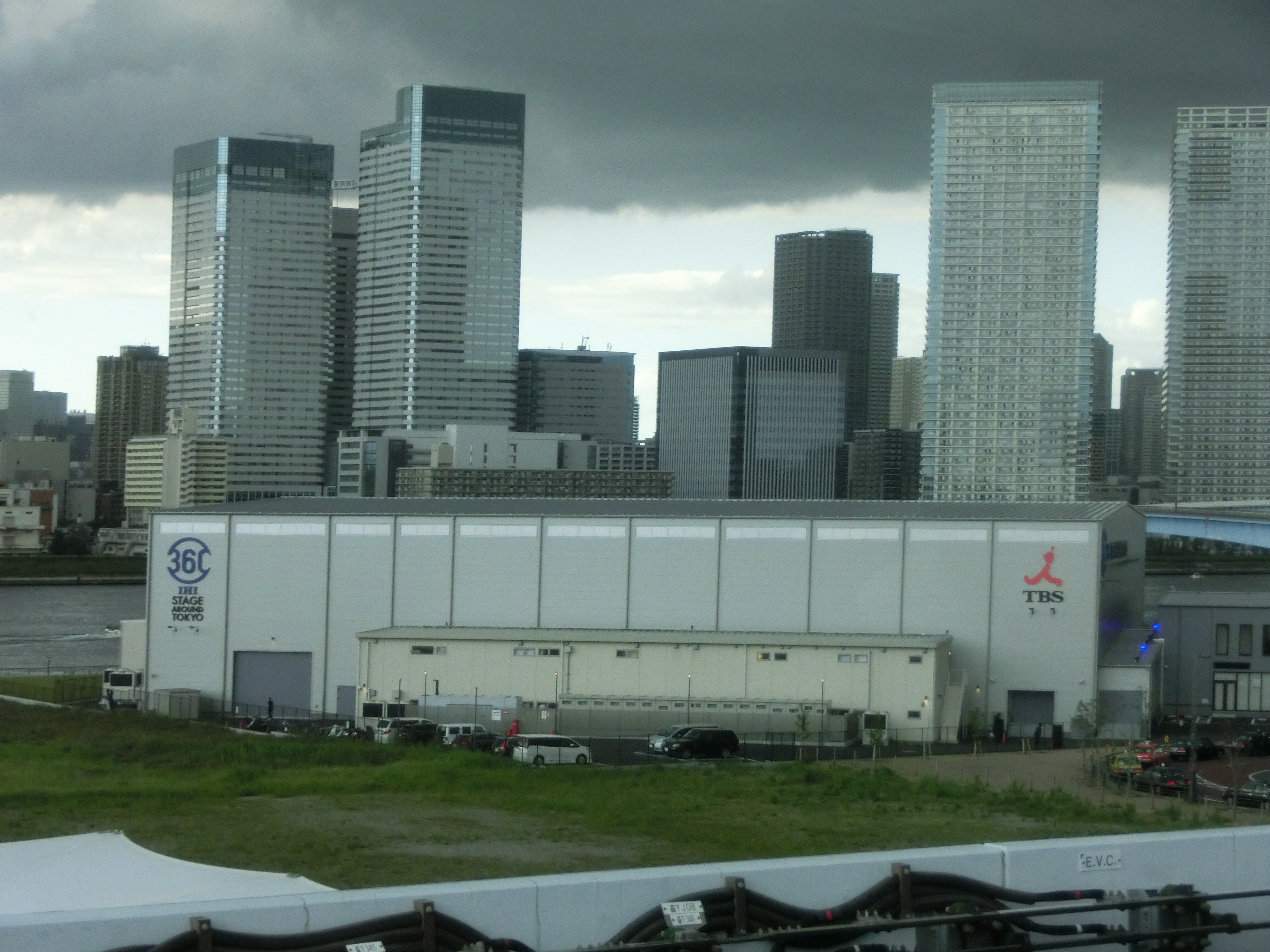 IHI STAGE AROUND TOKYO